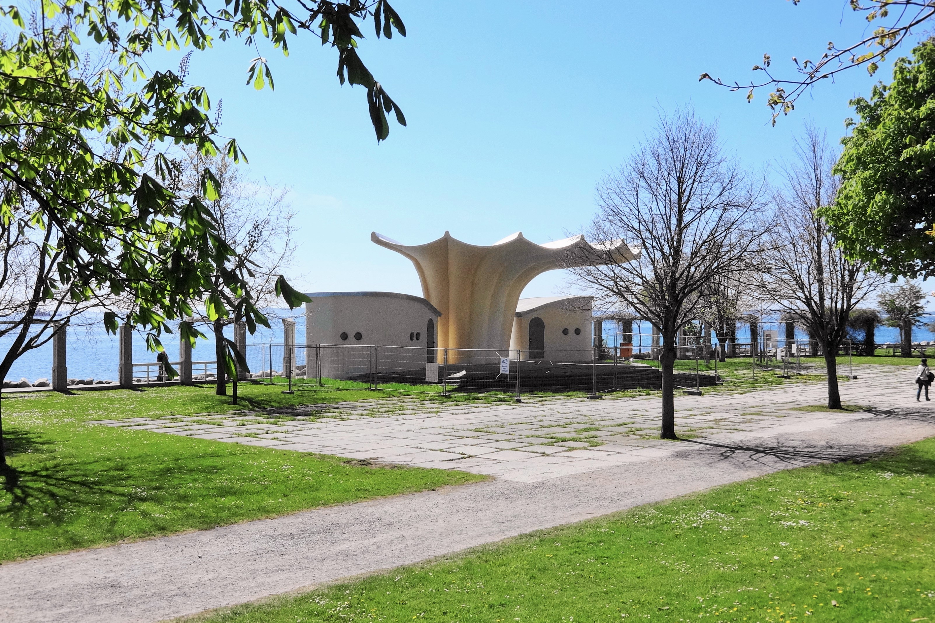 Die frisch renovierte Sassnitzer Kurmuschel am 06. Mai 2018.